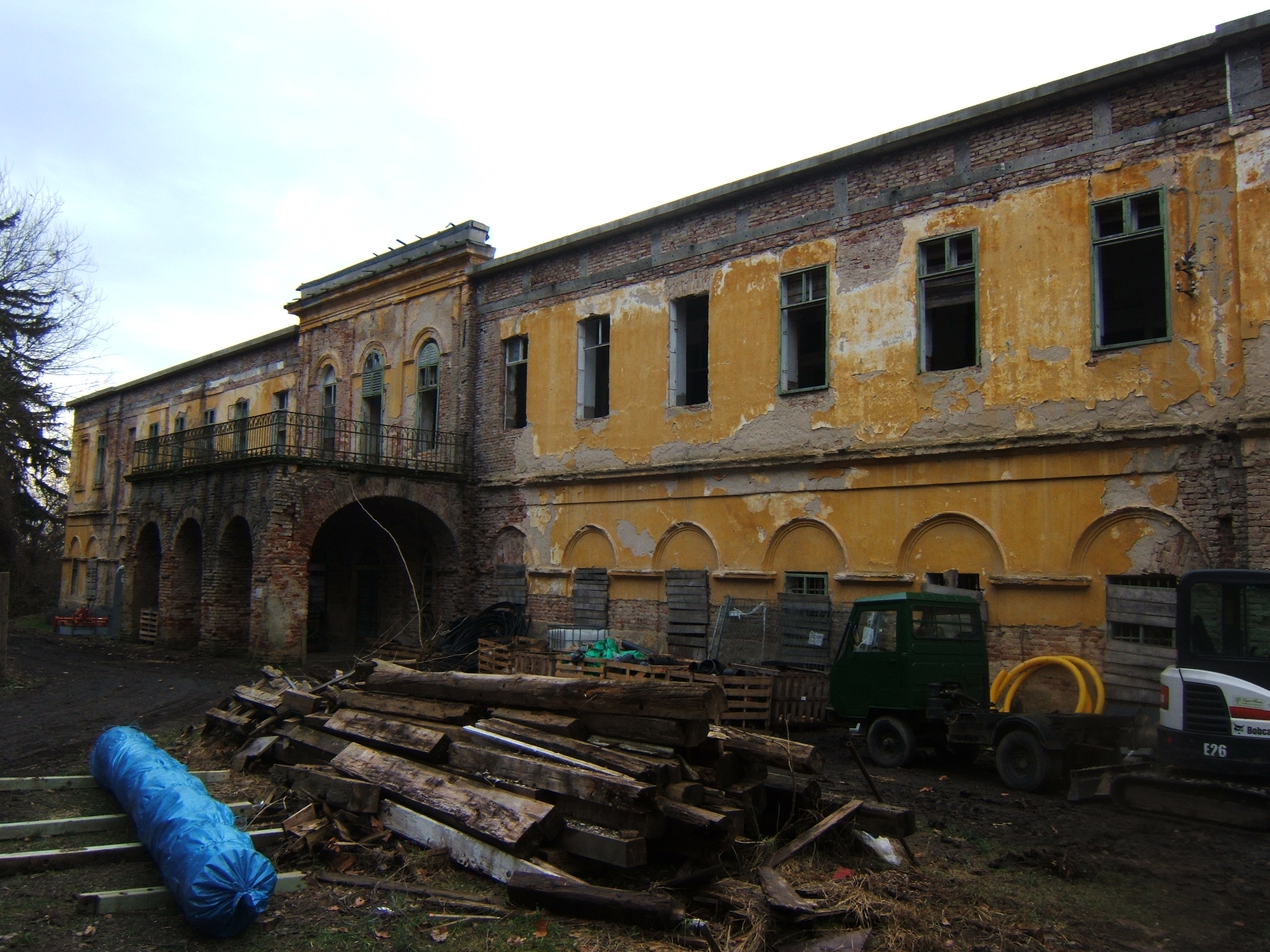 Alsóbogát, felújítás alatt álló kastély